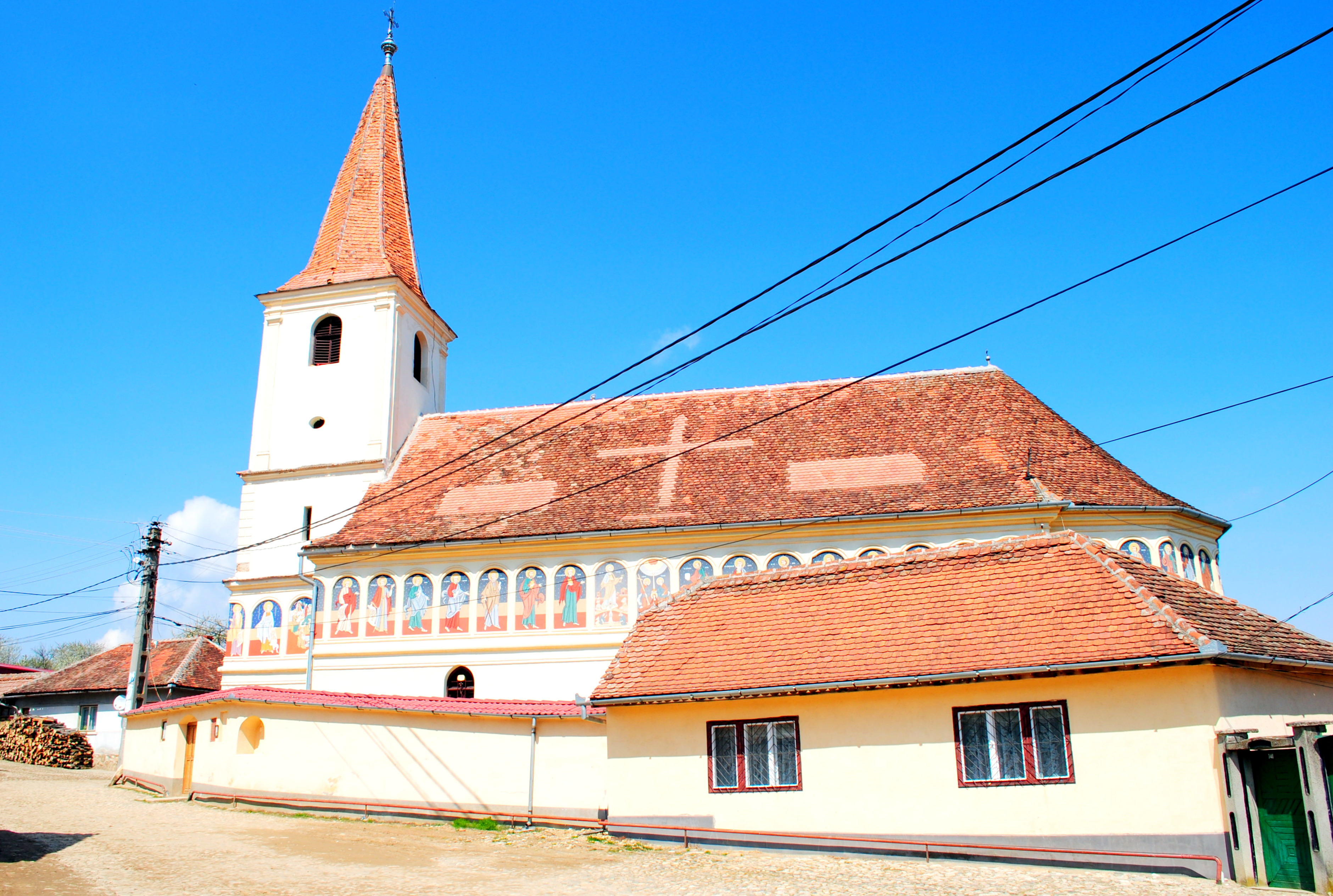 Ansamblul bisericii "Nașterea Sf. Ioan Botezătorul", sf. sec. XVIII- înc. sec. XIX